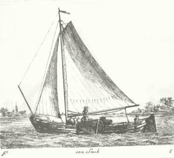 Een snik